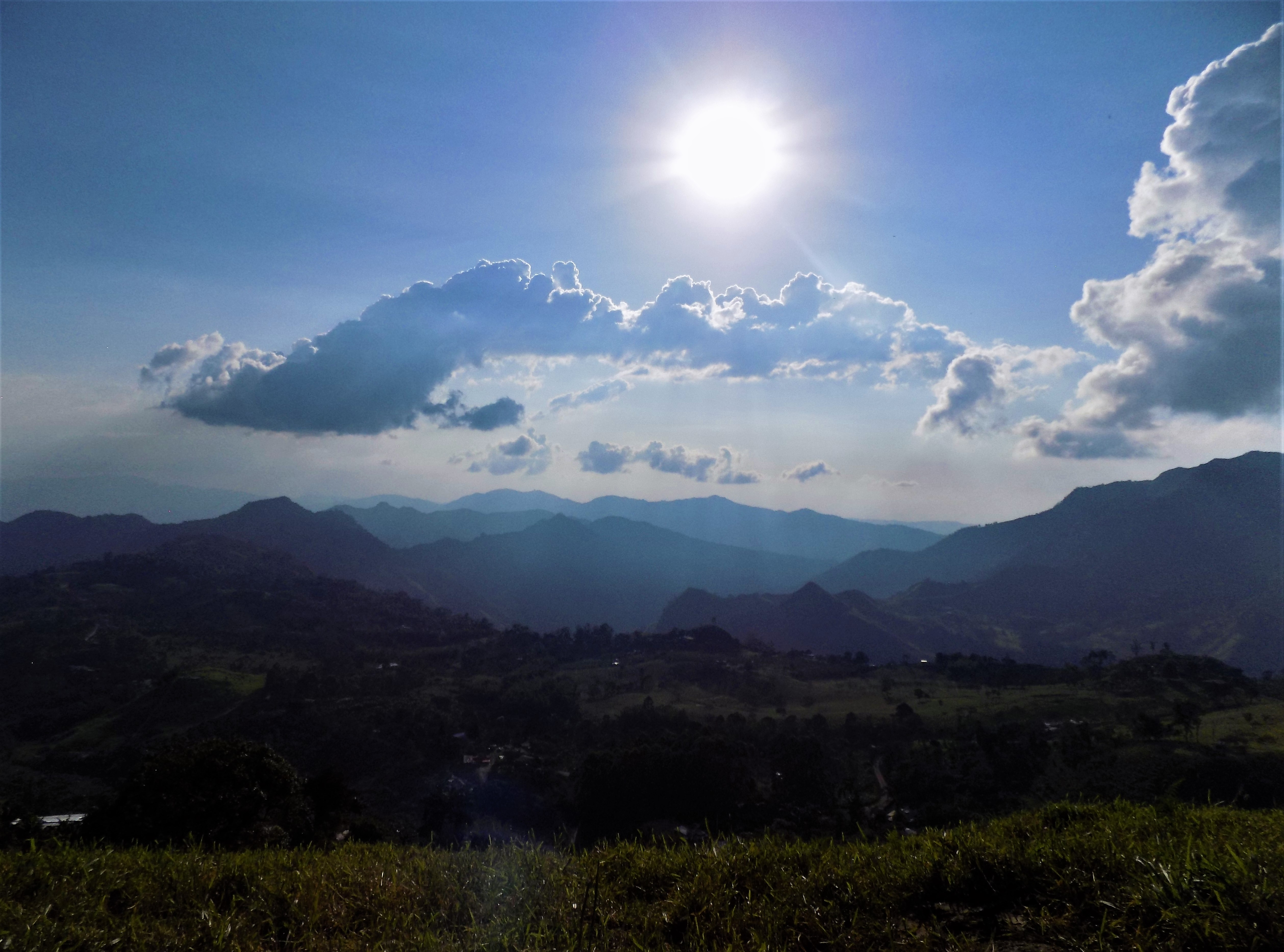 La violencia hace parte de la historia remota y reciente del municipio, sin embargo, la paz que actualmente se percibe ha permitido que algunas familias desplazadas retornen a sus territorios originarios y nuevamente retomen las actividades agropecuarias que históricamente se han desarrollado allí.